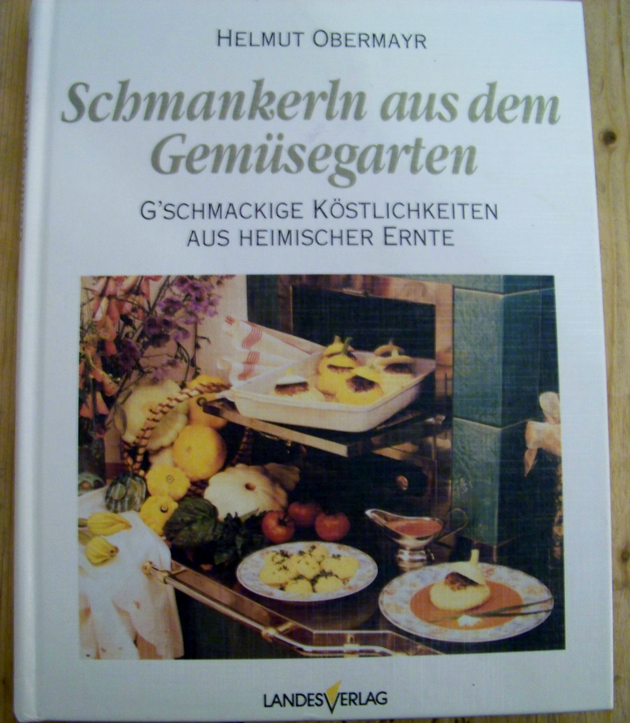 OO. Landesverlag, Linz Landstraße Nr. 41, ehem. Buchhandlung u. Verlag